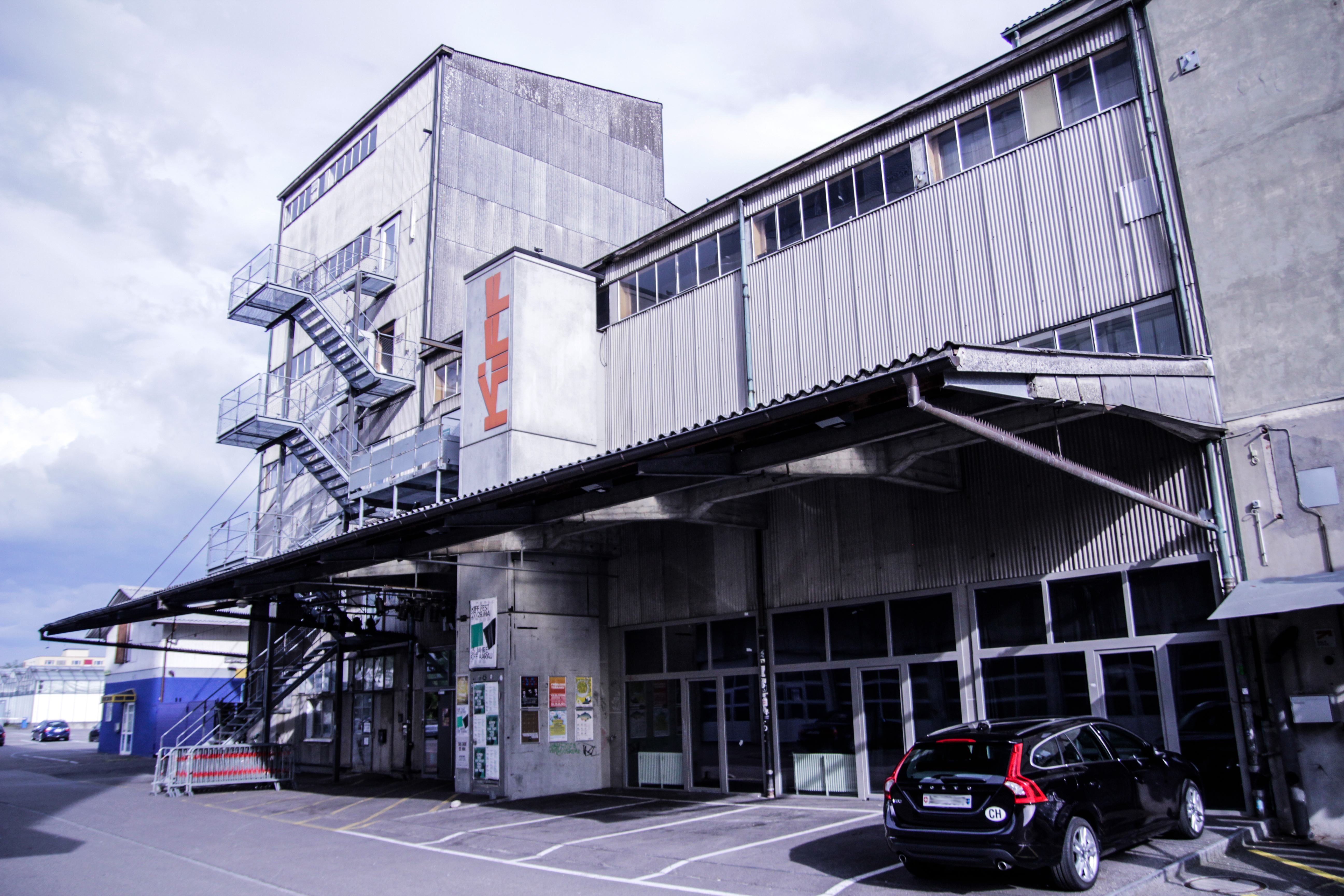 Aussenansicht KIFF Kultur in der Futterfabrik